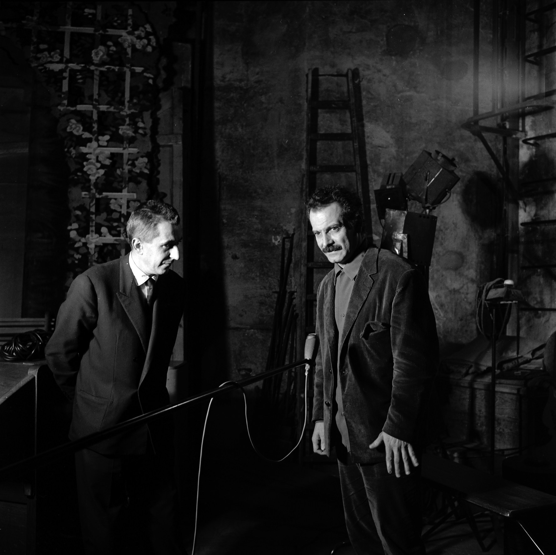 Théâtre du Capitole. Le 2 Décembre 1963. Vue de Georges Brassens avec une autre personne sur la scène du théâtre du Capitole.